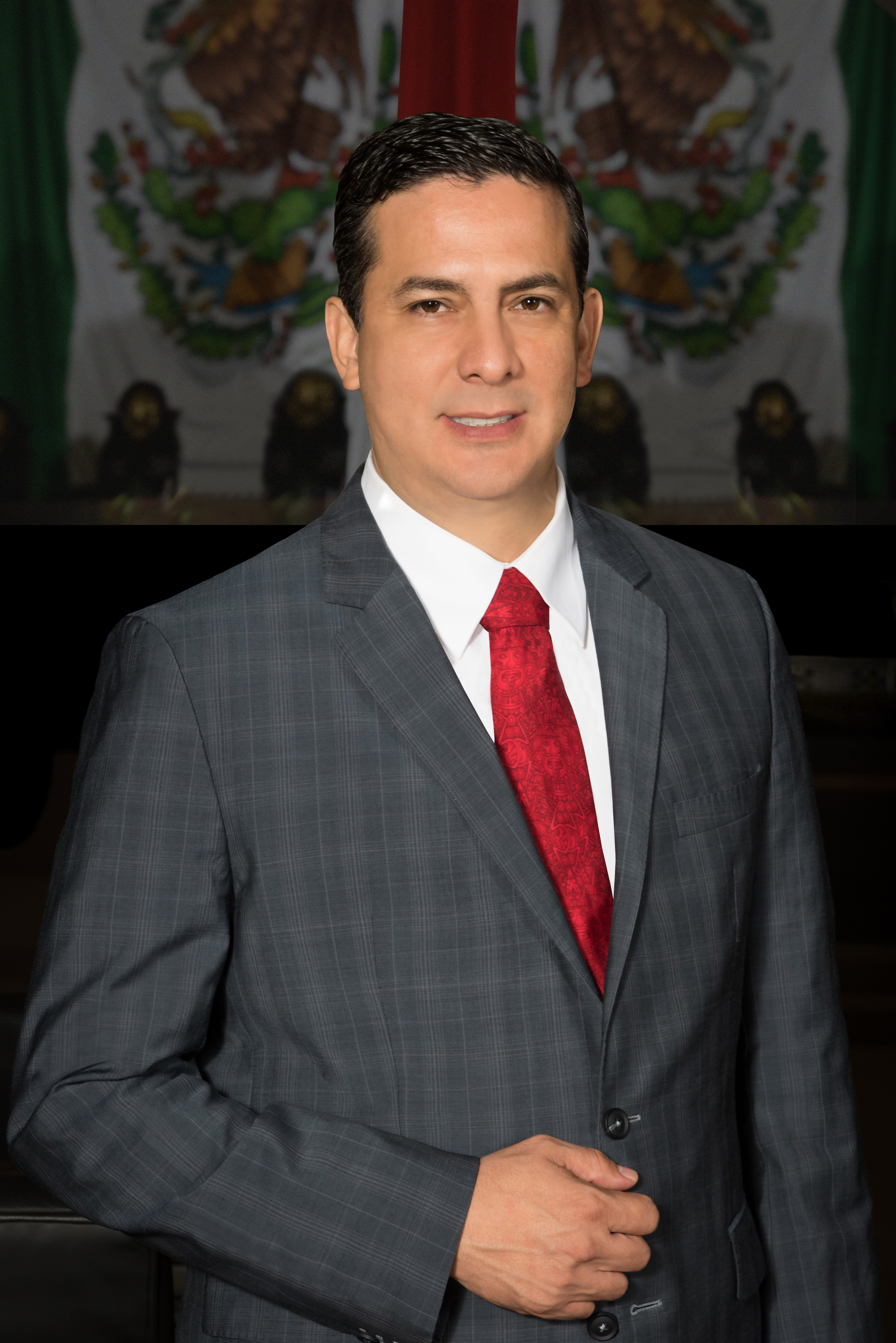 Ramiro Ramos Salinas en el congreso.